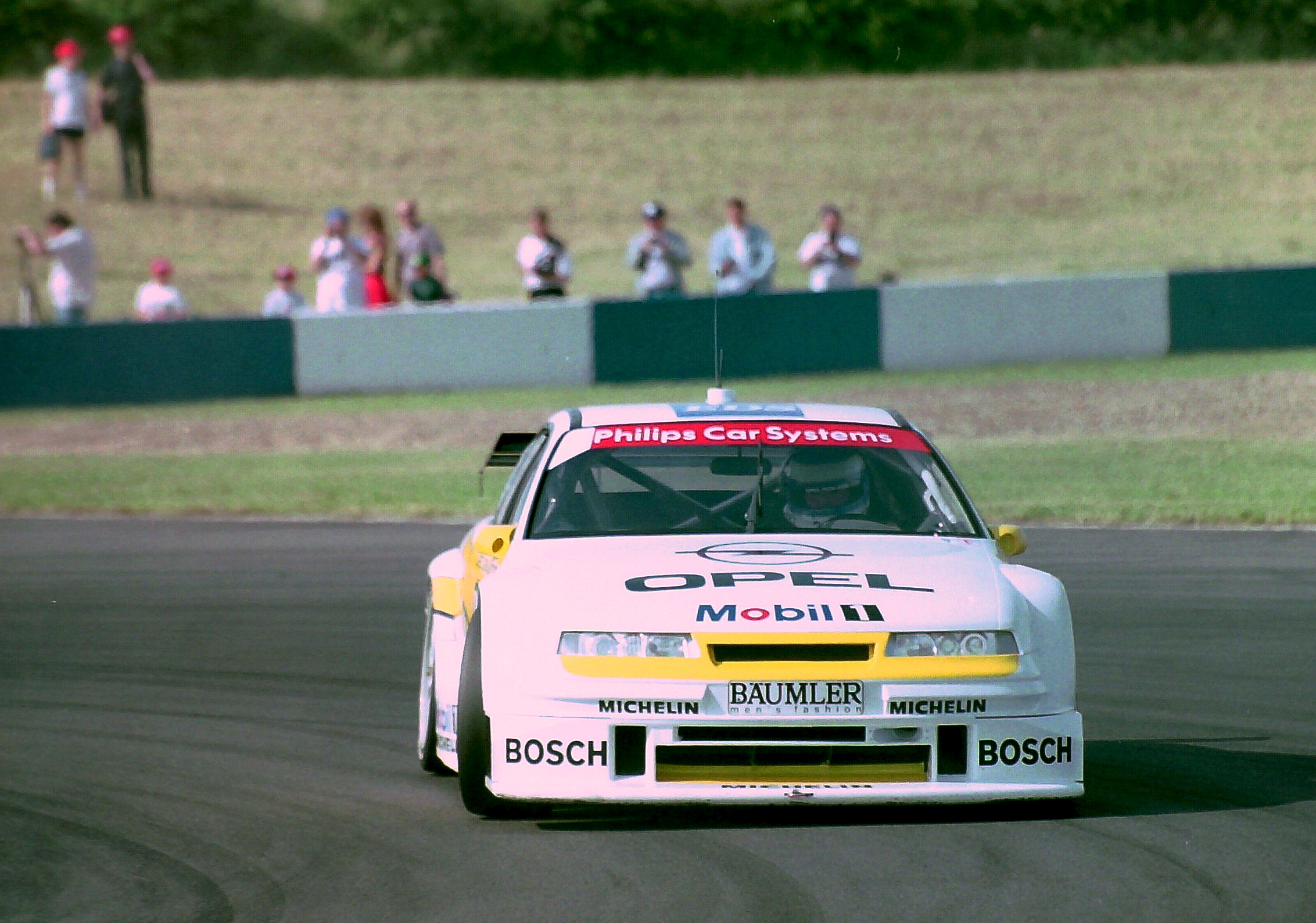 Keke Rosberg - Opel Team Joest - Opel Calibra V6 at Melbourne Hairpin